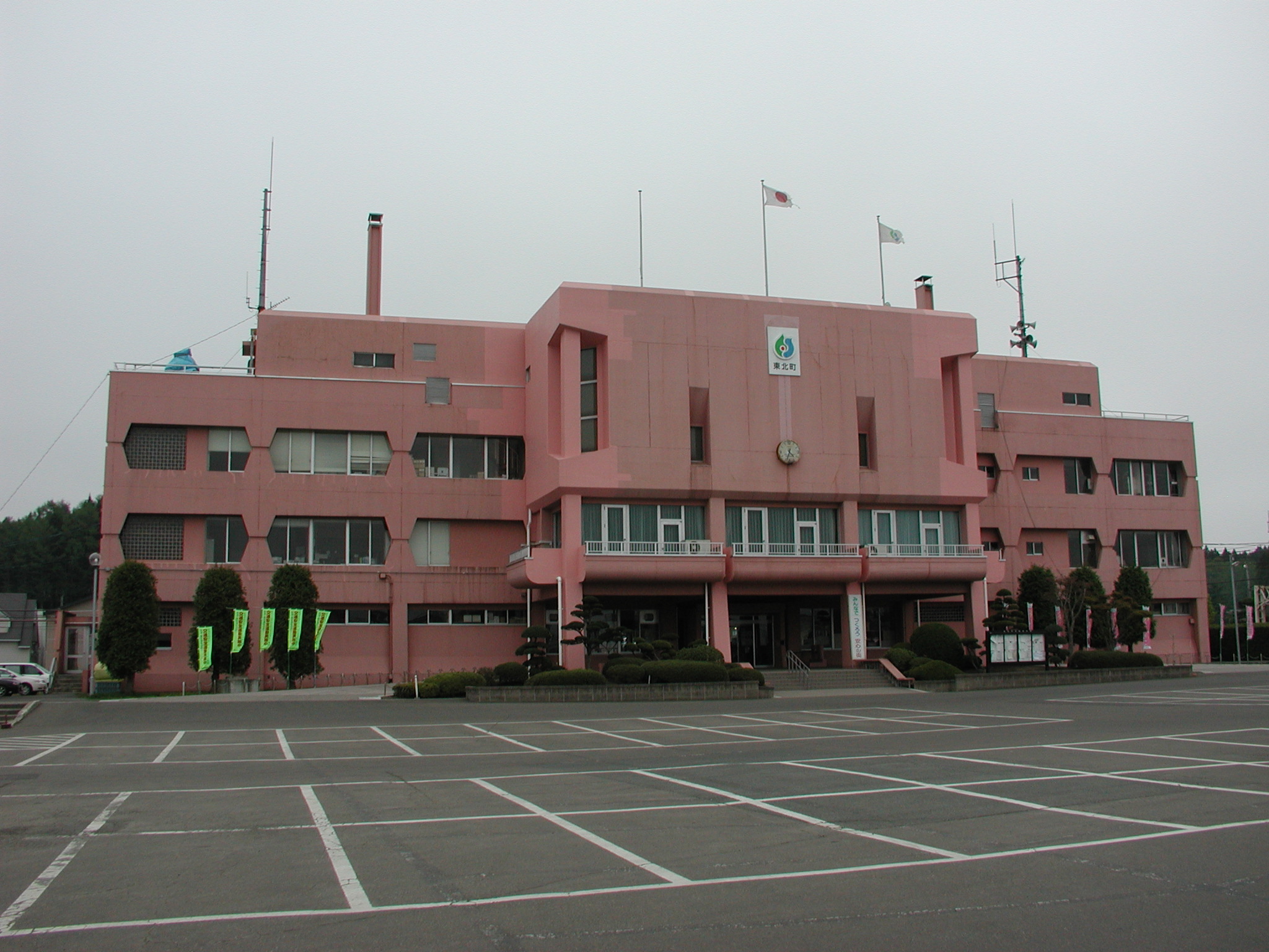 東北町役場 本庁舎（旧：上北町役場）